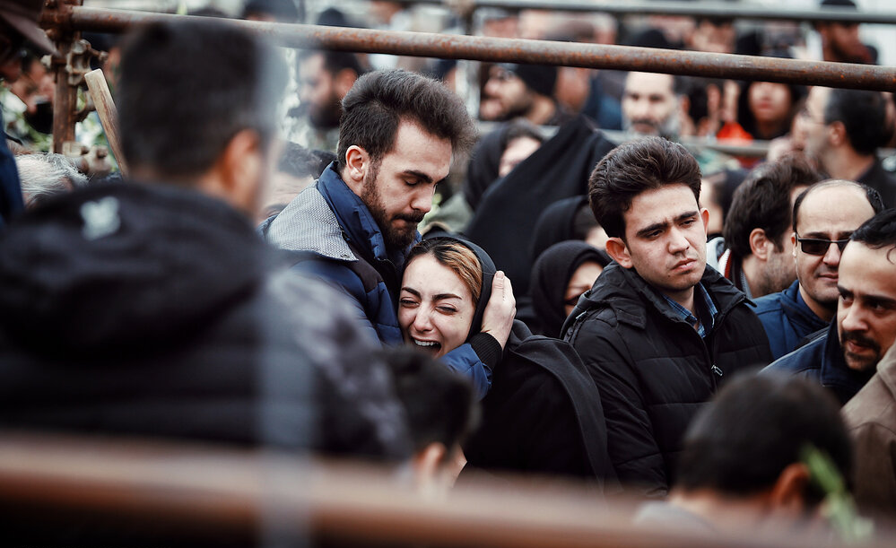 تشییع جنازهٔ قربانیان سقوط هواپیمای مسافربری اوکراینی بوئینگ ۷۳۷-۸۰۰ در همدان